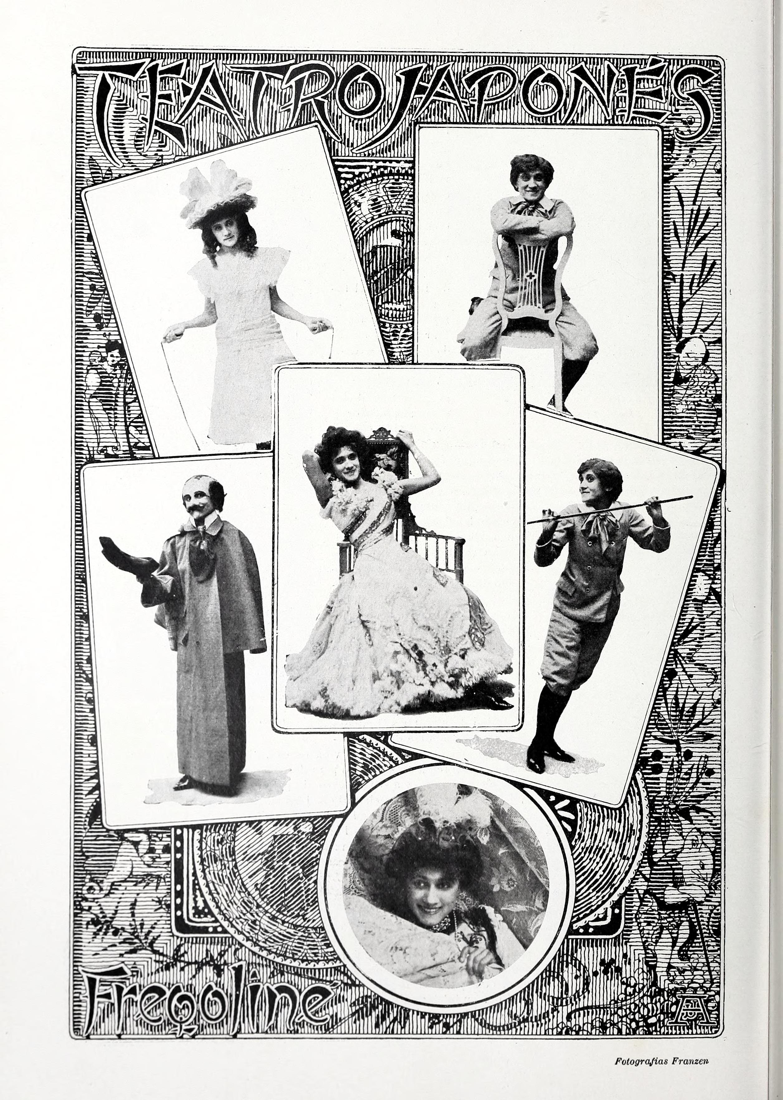 Teatro Japonés. Fregoline.